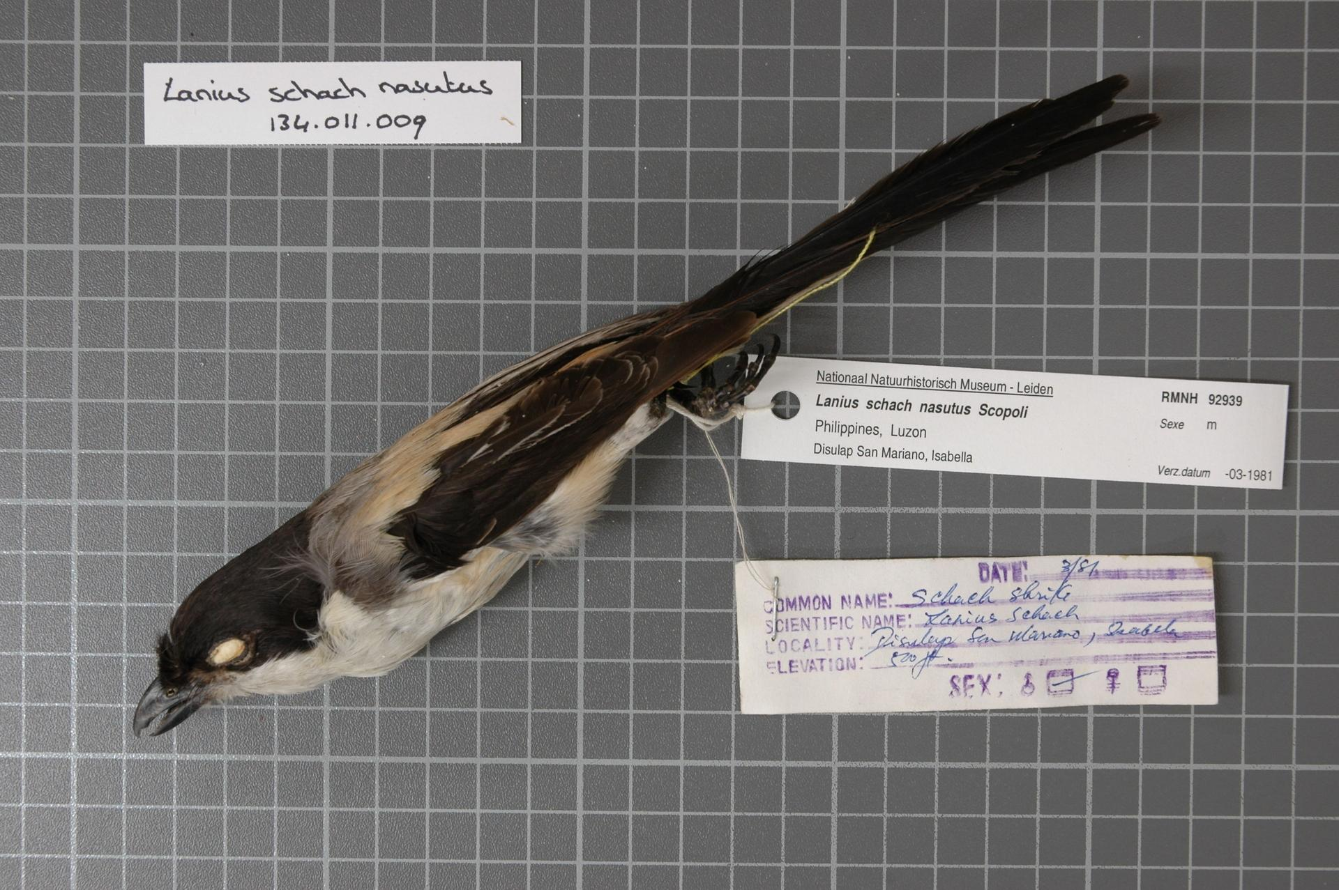 Lanius schach nasutus Scopoli, 1786